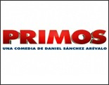 Cartel promocional de la próxima película de Daniel Sánchez Arévalo que se estrenara en 2011